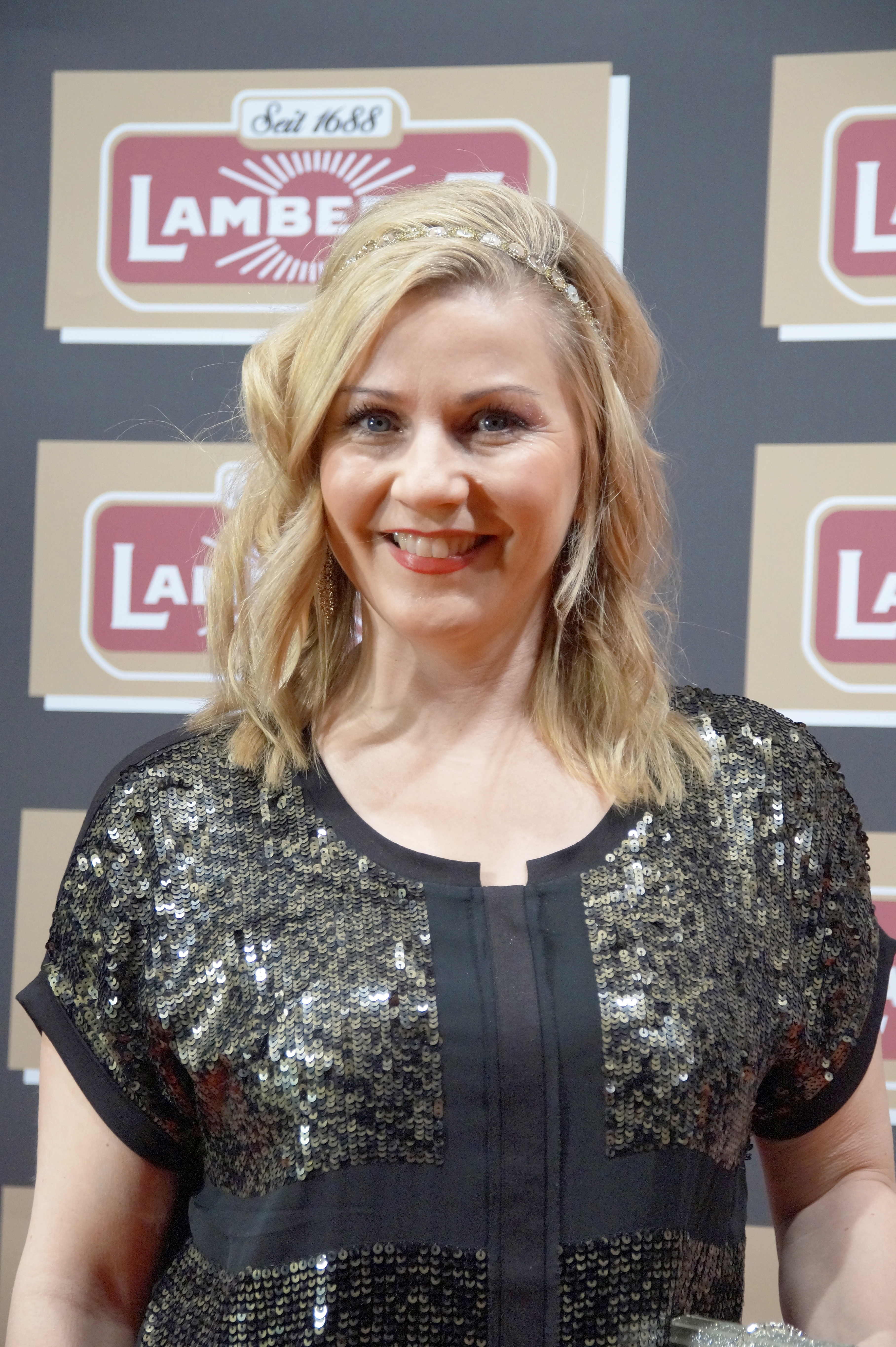 Aleksandra Bechtel bei der Lambertz Monday Night, im Februar 2016.